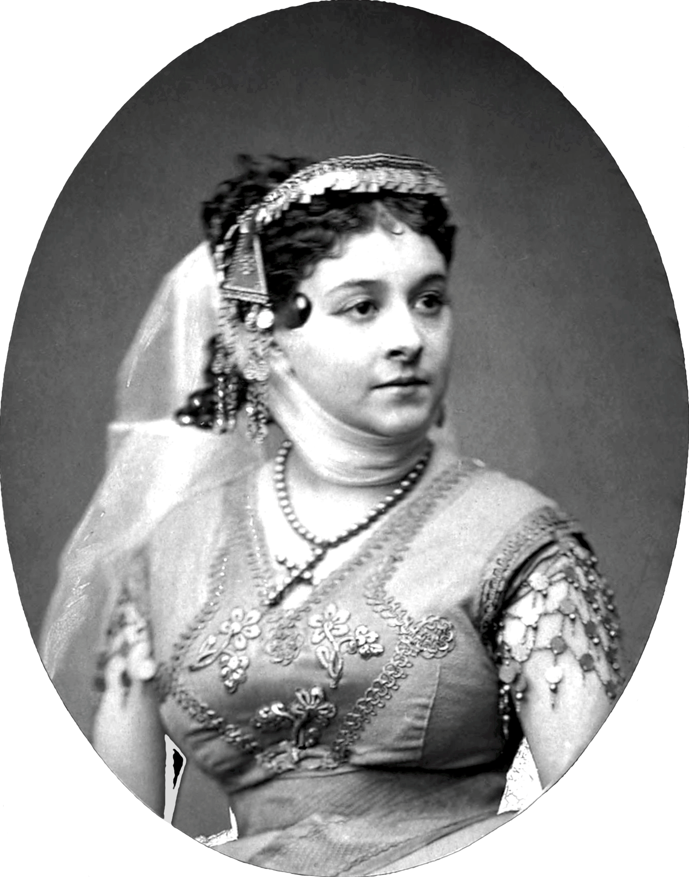 Céline Montaland (1843–1891), comédienne, chanteuse et danseuse française.